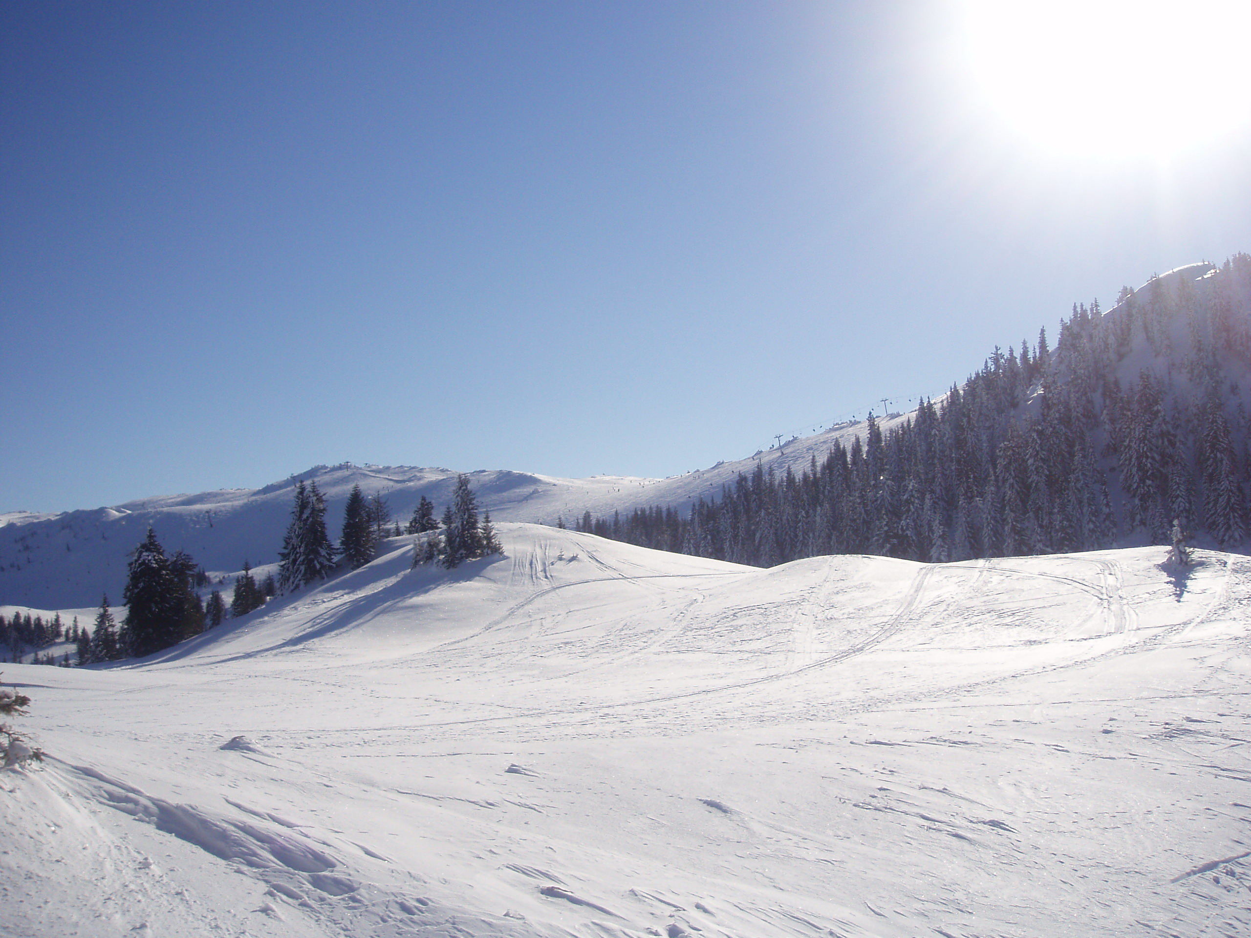 Jahorina